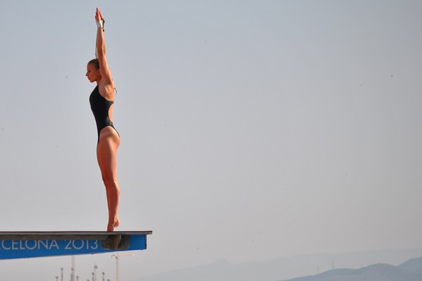 Photo prise lors des championnats du Monde de Barcelone en 2013 avec mon appareil personnel